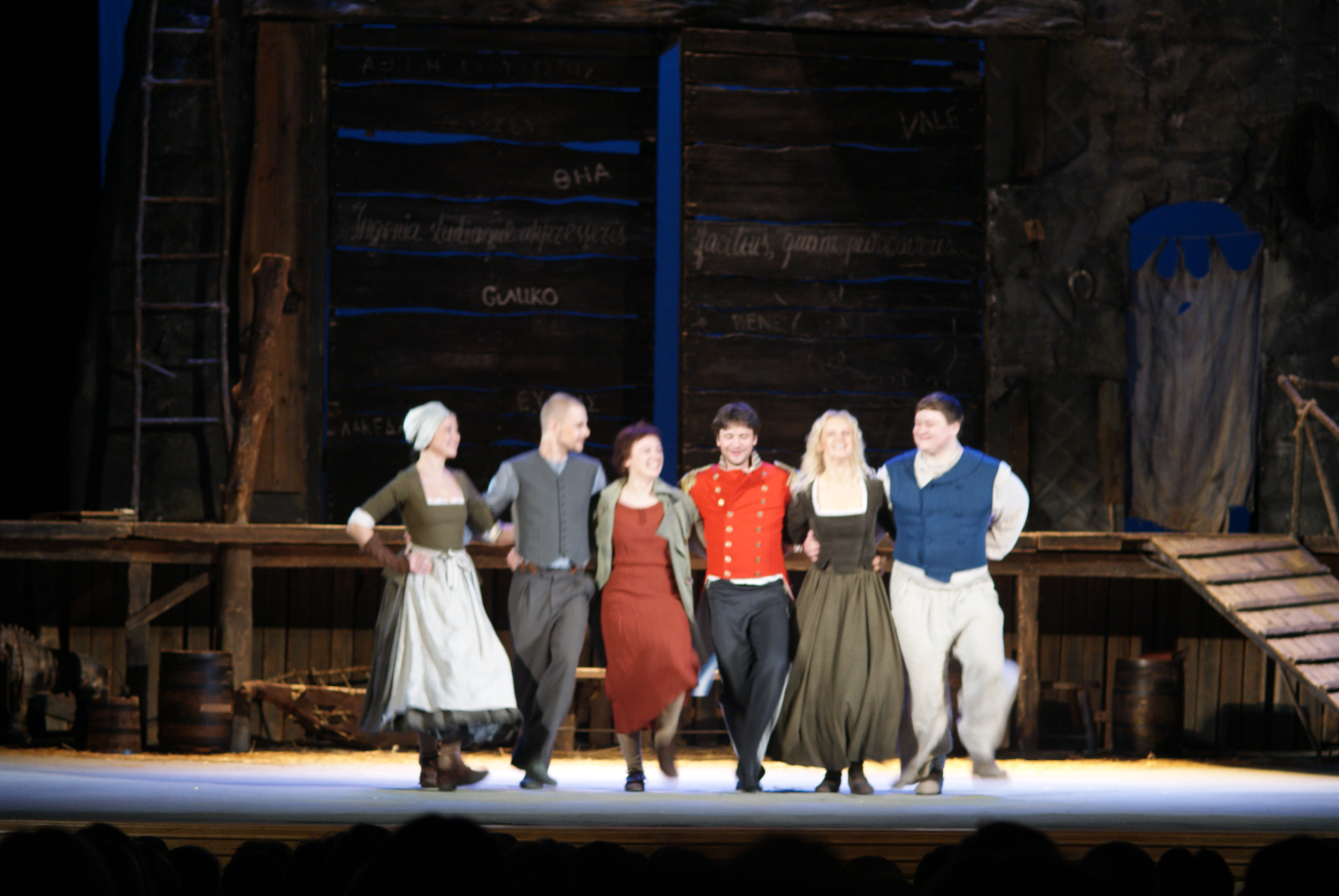 Translations Купалаўскага тэатру ў Палацы культуры прафсаюзаў. Мінск